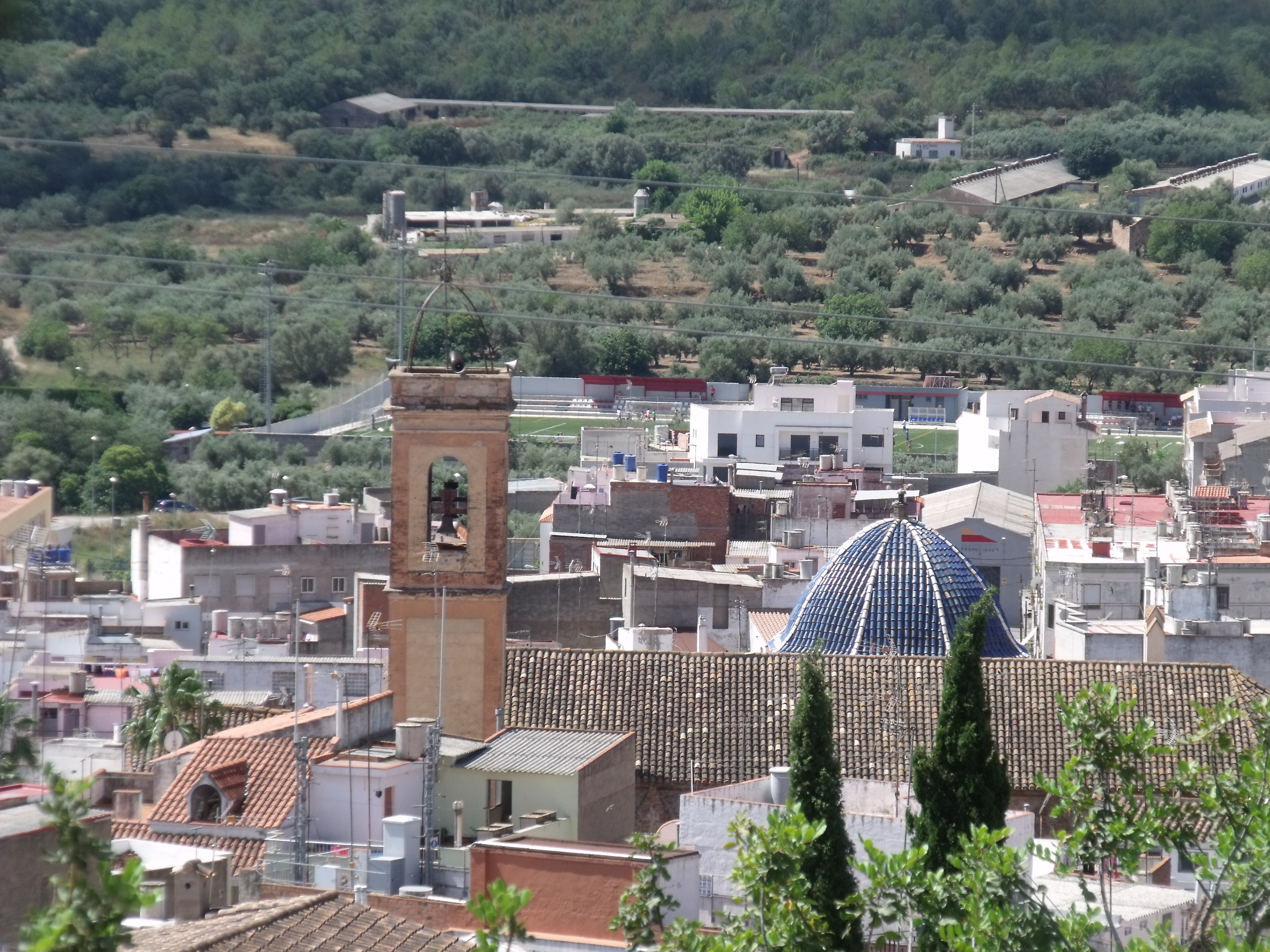 Vista de Artana desde el calvario